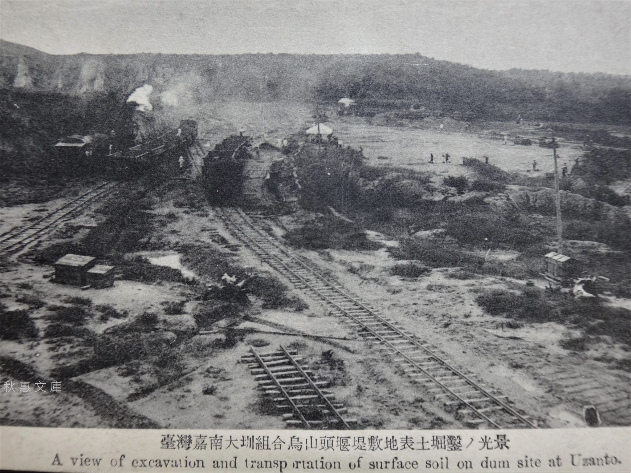 如圖片所示